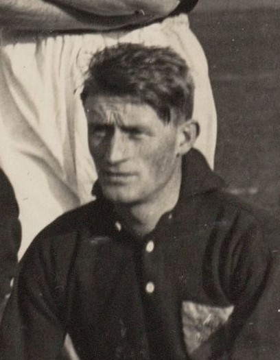 Evert van der Heijden.